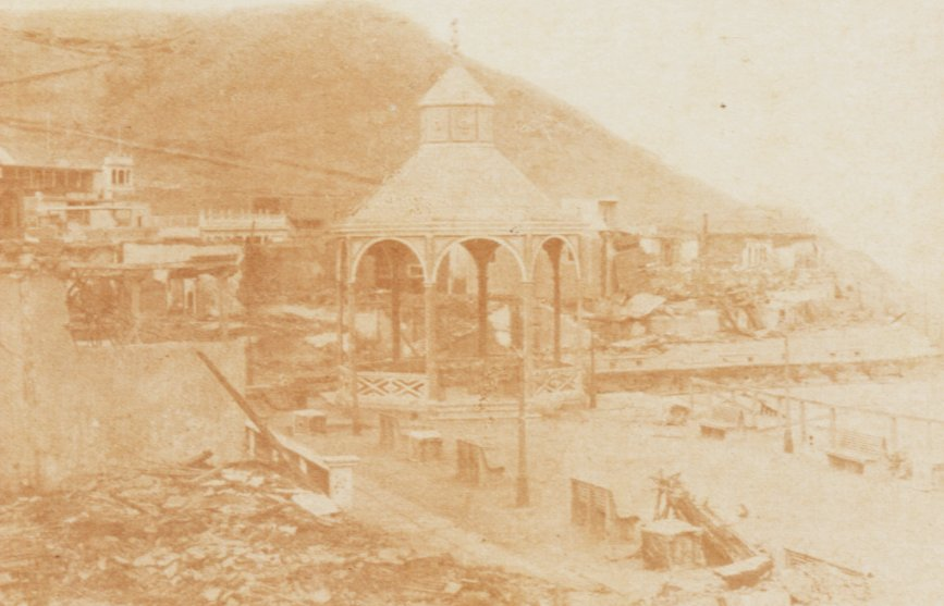 Malecón del aristocrático balneario de Chorrillos totalmente destruido luego de la batalla, el 13 de enero de 1881.